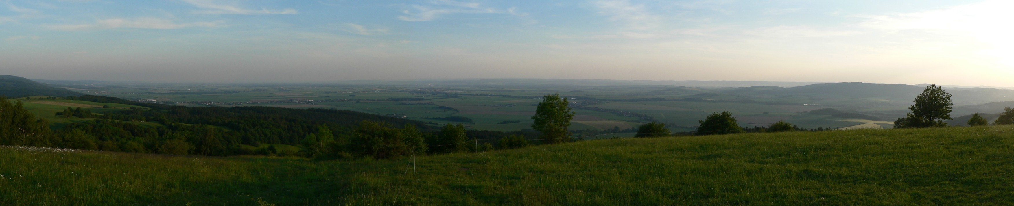 Hornomoravský úval od Olomouce nahoru, pohled z Křížového vrchu.